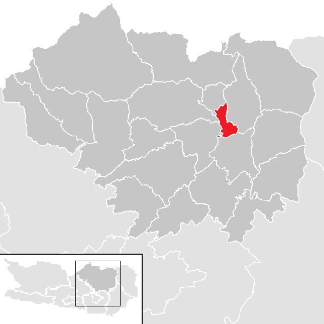 Bezirk Sankt Veit an der Glan